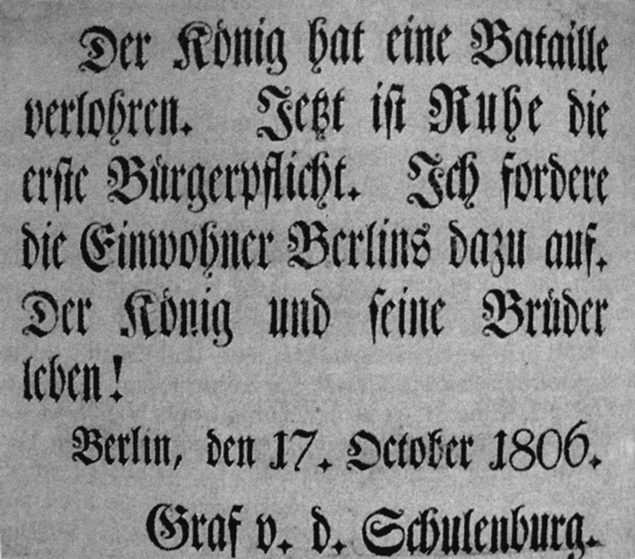 Affiche placardée sur les murs de Berlin après les défaites d'Iéna et Auerstaedt de 1806.